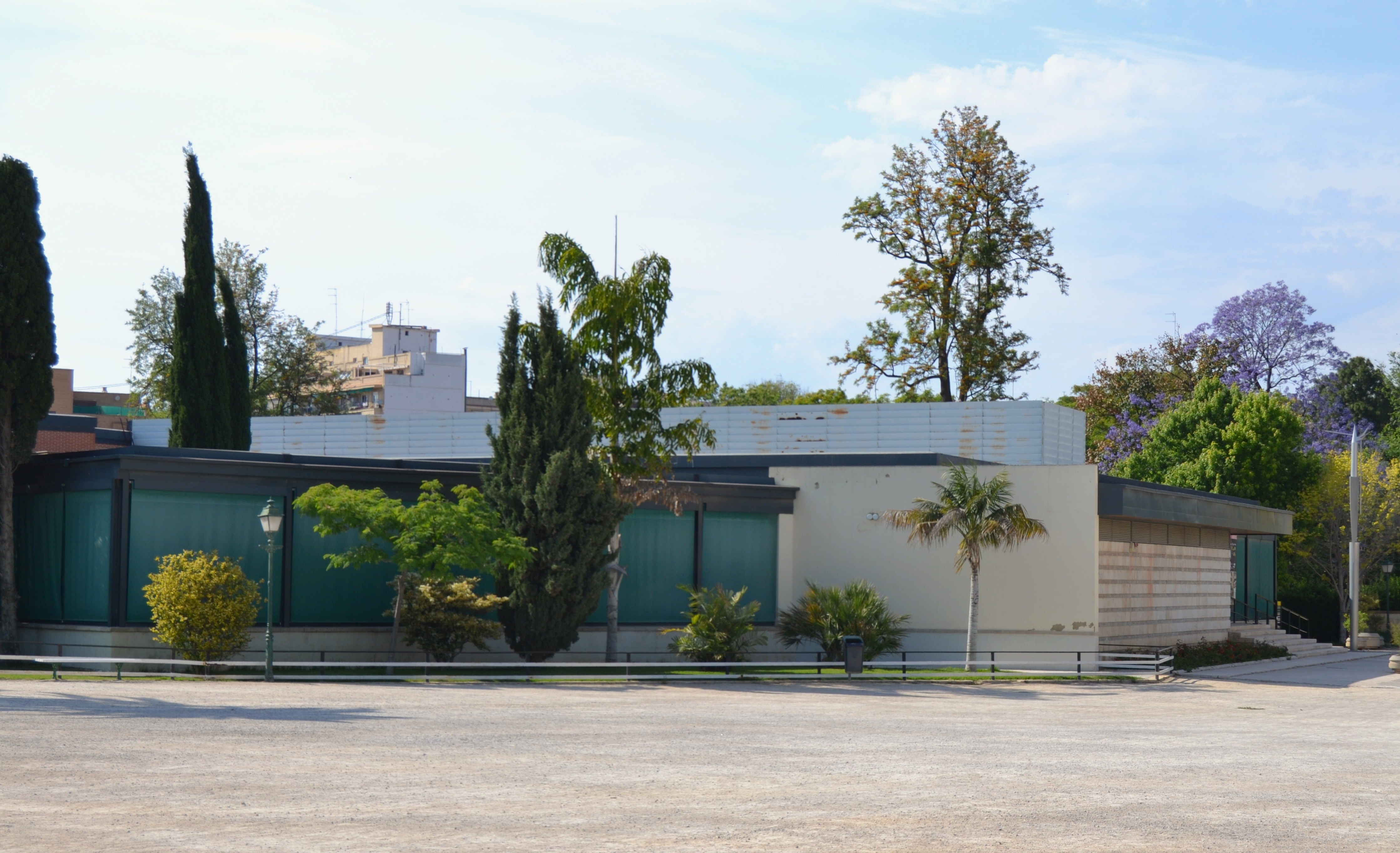 València, exterior del Museu de Ciències Naturals.